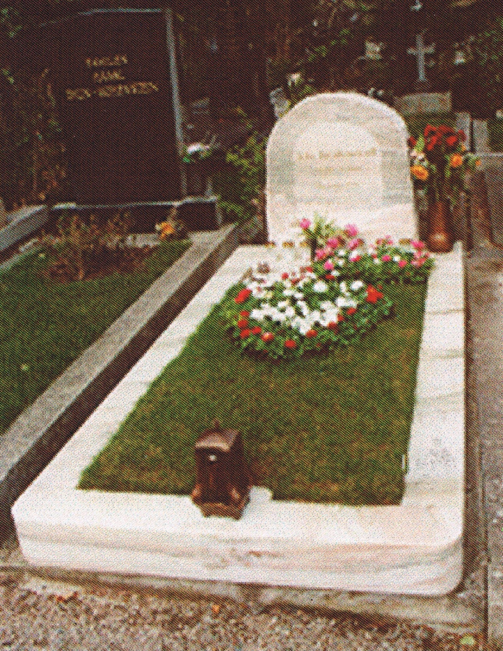 Friedhof Grinzing-Ida Krottendorf